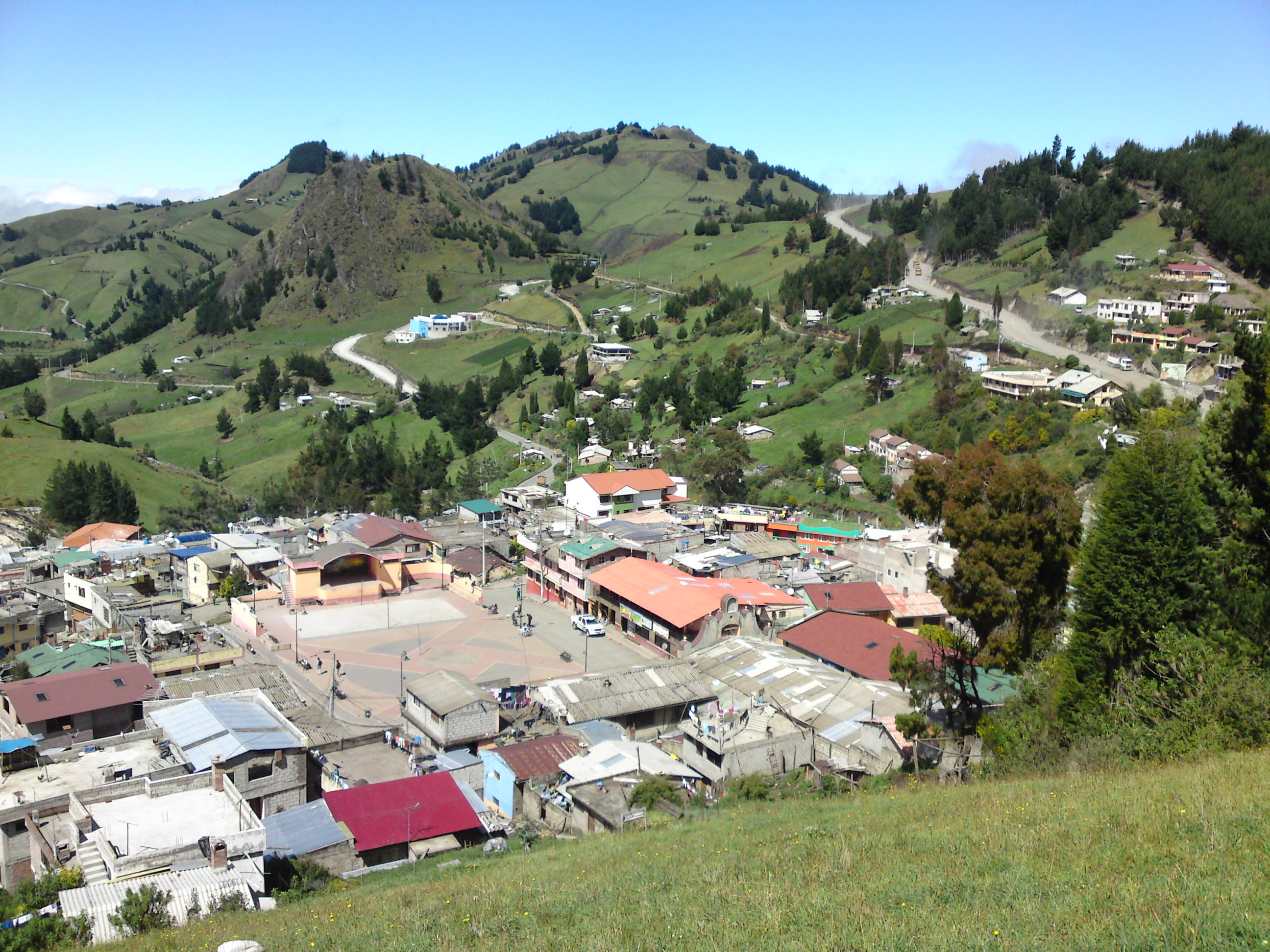 Vista Panorámica de la Parroquia Salinas de Guaranda en la provincia Bolívar